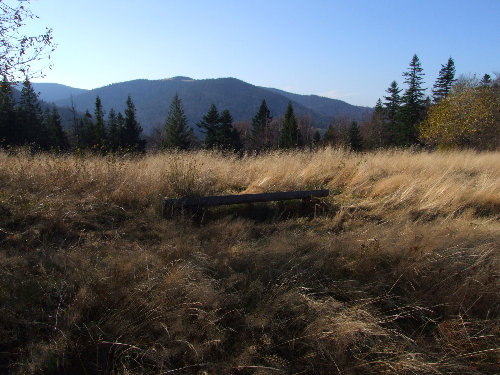 Polana Figurki Niznie w Gorcach. Widok na Mostownicę